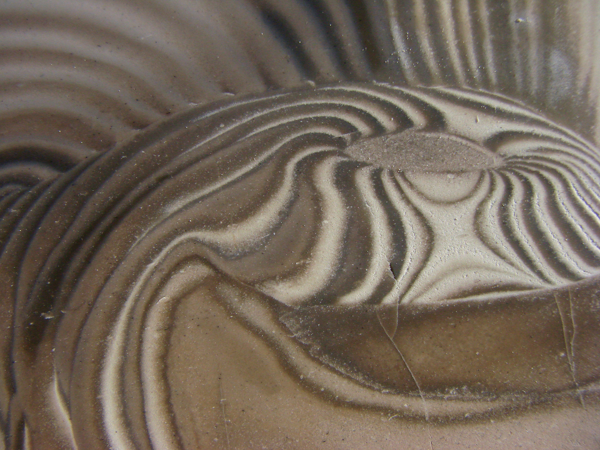 Plaque de silex rubané, gros plan.